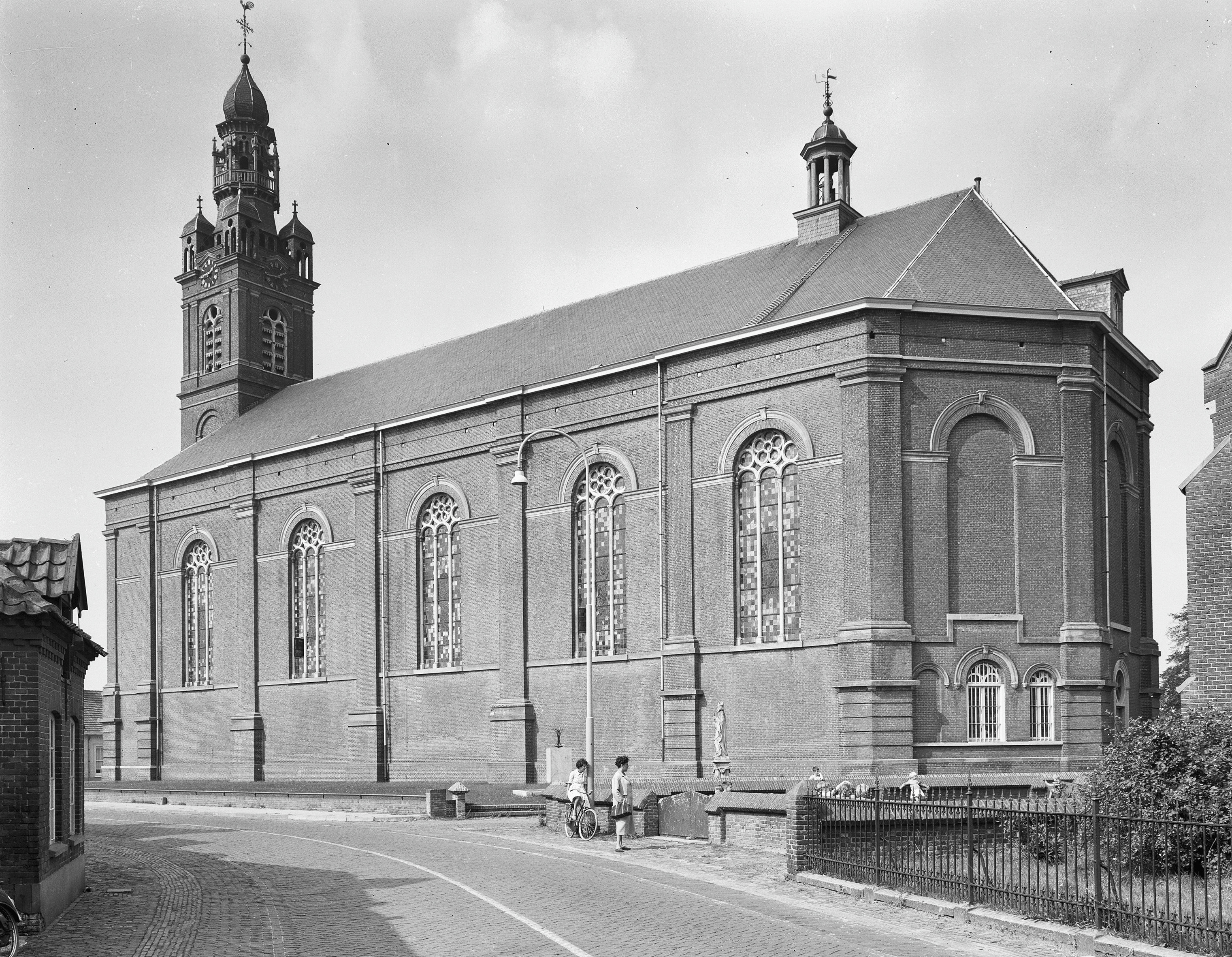 Rooms-Katholieke Kerk: exterieur overzicht naar het noord-westen